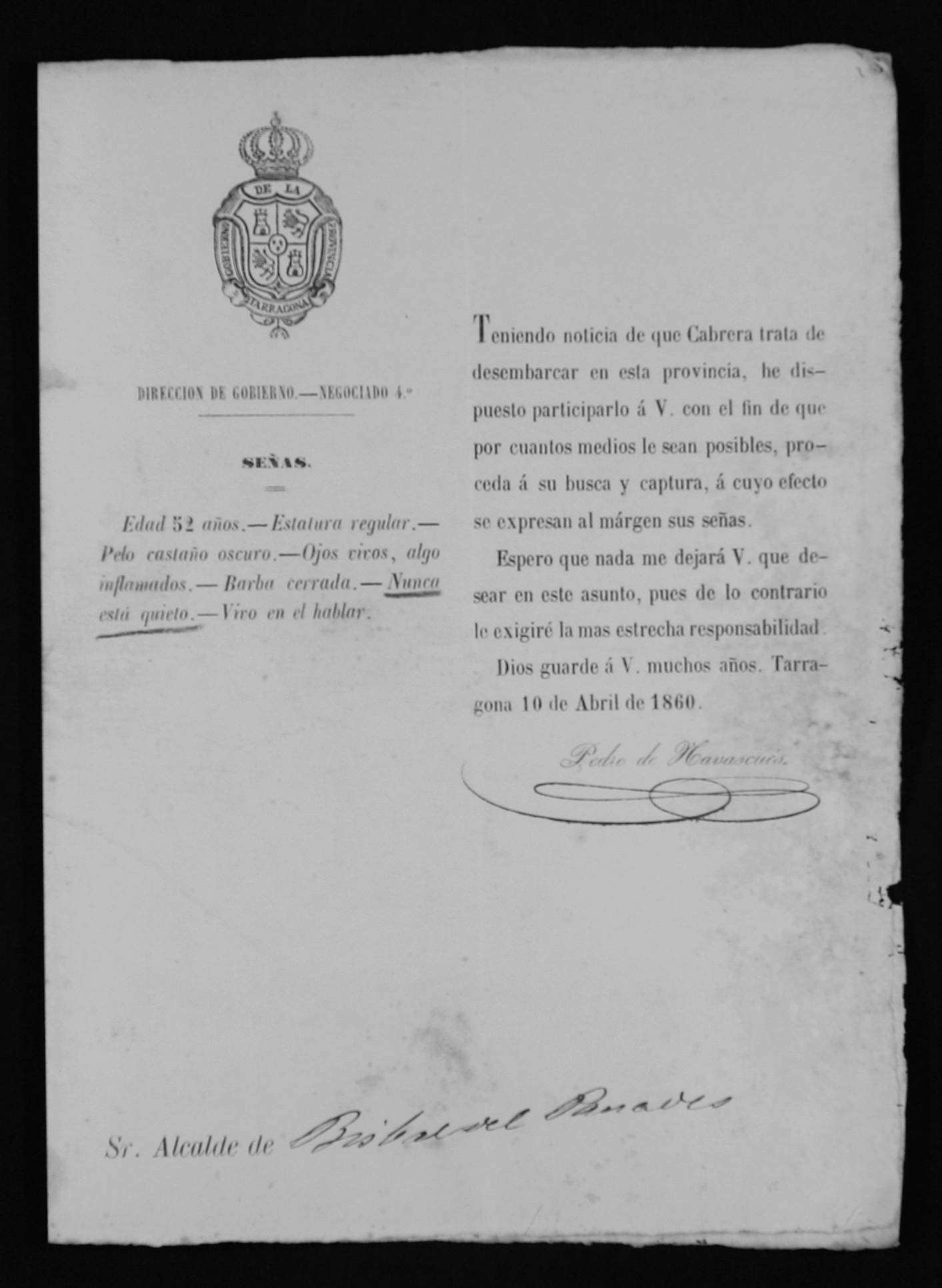 Escrit del Governador de la provincia de Tarragona, adreçat a l'ajuntament de la Bisbal del Penedès demanan la búsqueda i captura de Ramon Cabrera. 1o d'abril de 1860. Arxiu Comarcal del baix penedès